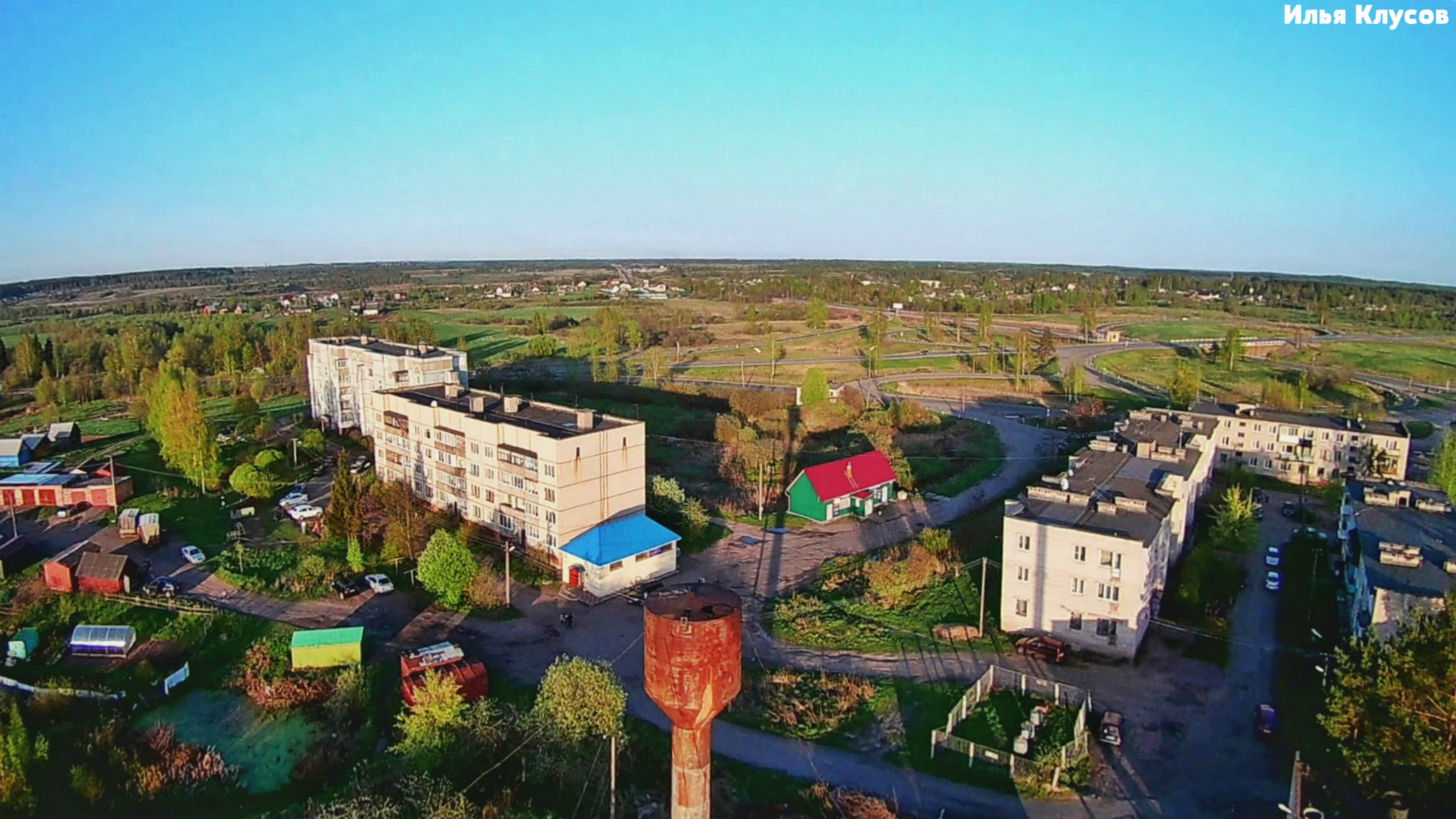 п.Дорожный с высоты